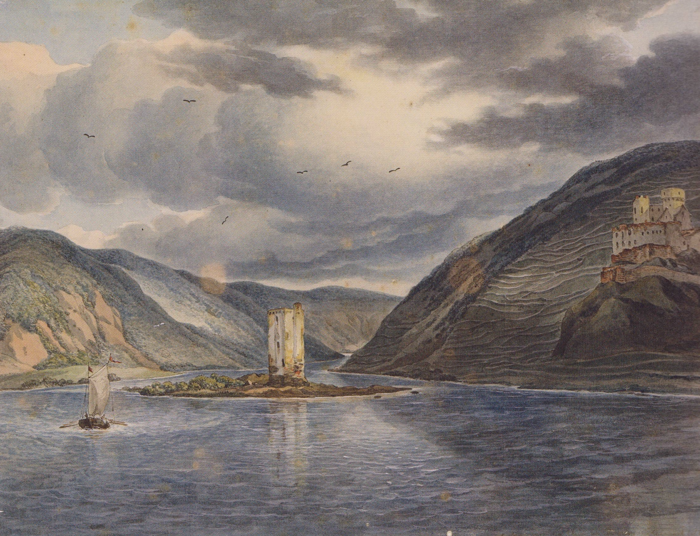 Johann Christian Reinhart: Der Mäuseturm und die Ruine Ehrenfels. Aquarell, Feder in Braun, über Graphit, Deckweiß, 1787, 31,2 x 40,8 cm. Hof, Museum Bayerisches Vogtland.